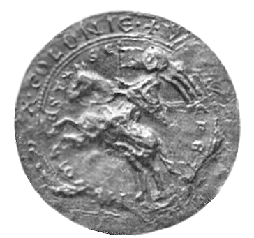 Władysław Odonic seal